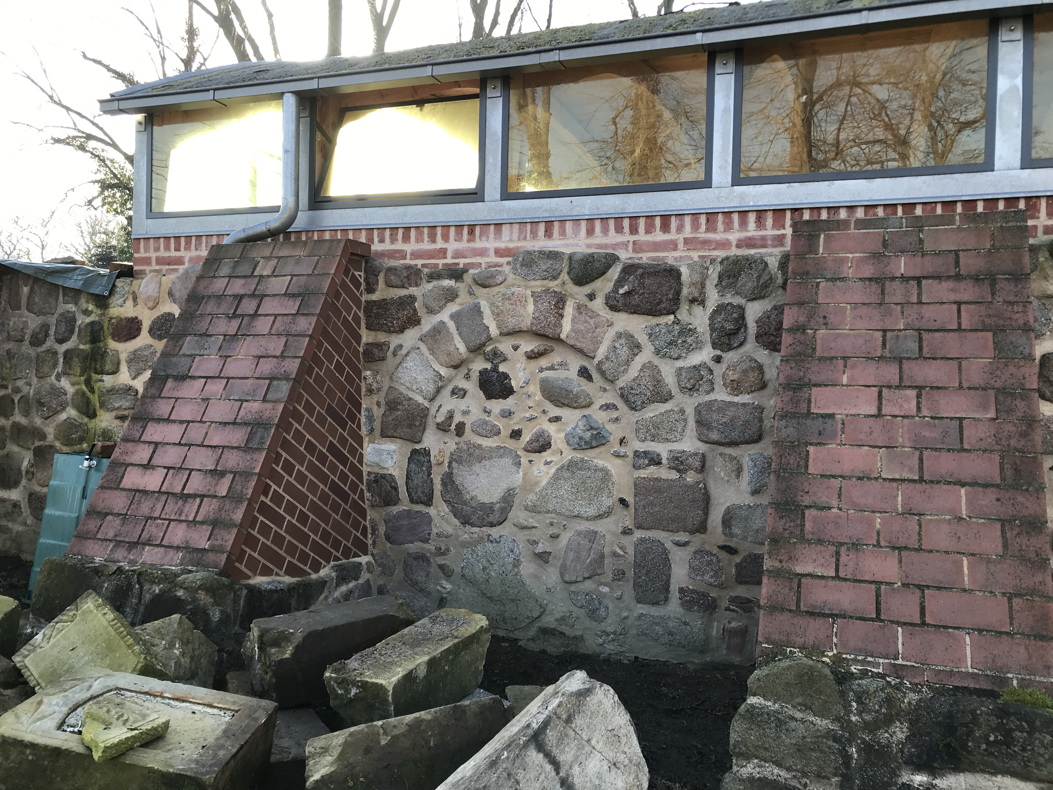 Dorfkirche Heinsdorf, spätromanische Kirche in Niebendorf-Heinsdorf in Brandenburg. Das Bauwerk wurde 1970 teilweise abgetragen.